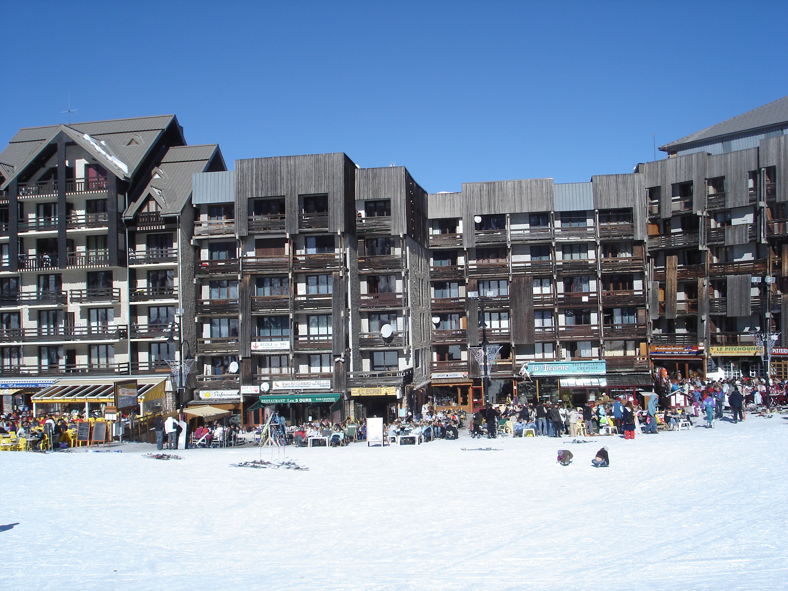 (Ville de Risoul-Hautes-Alpes) Auteur : Jean-Claude Perez